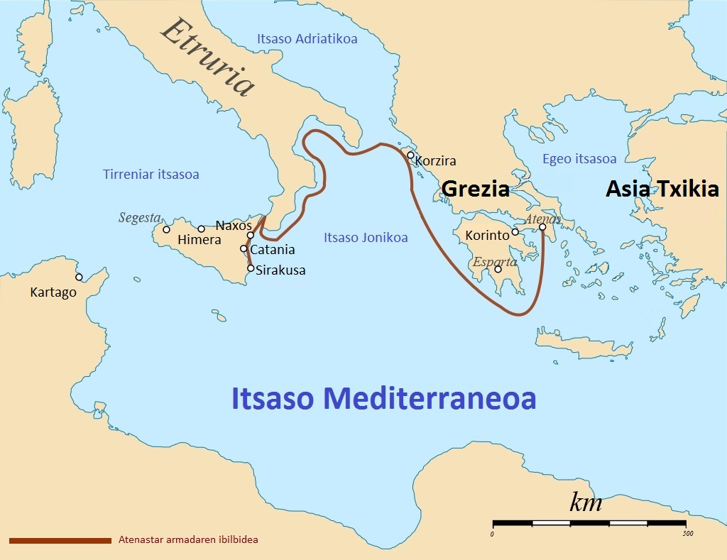 Atenastarren espedizioa